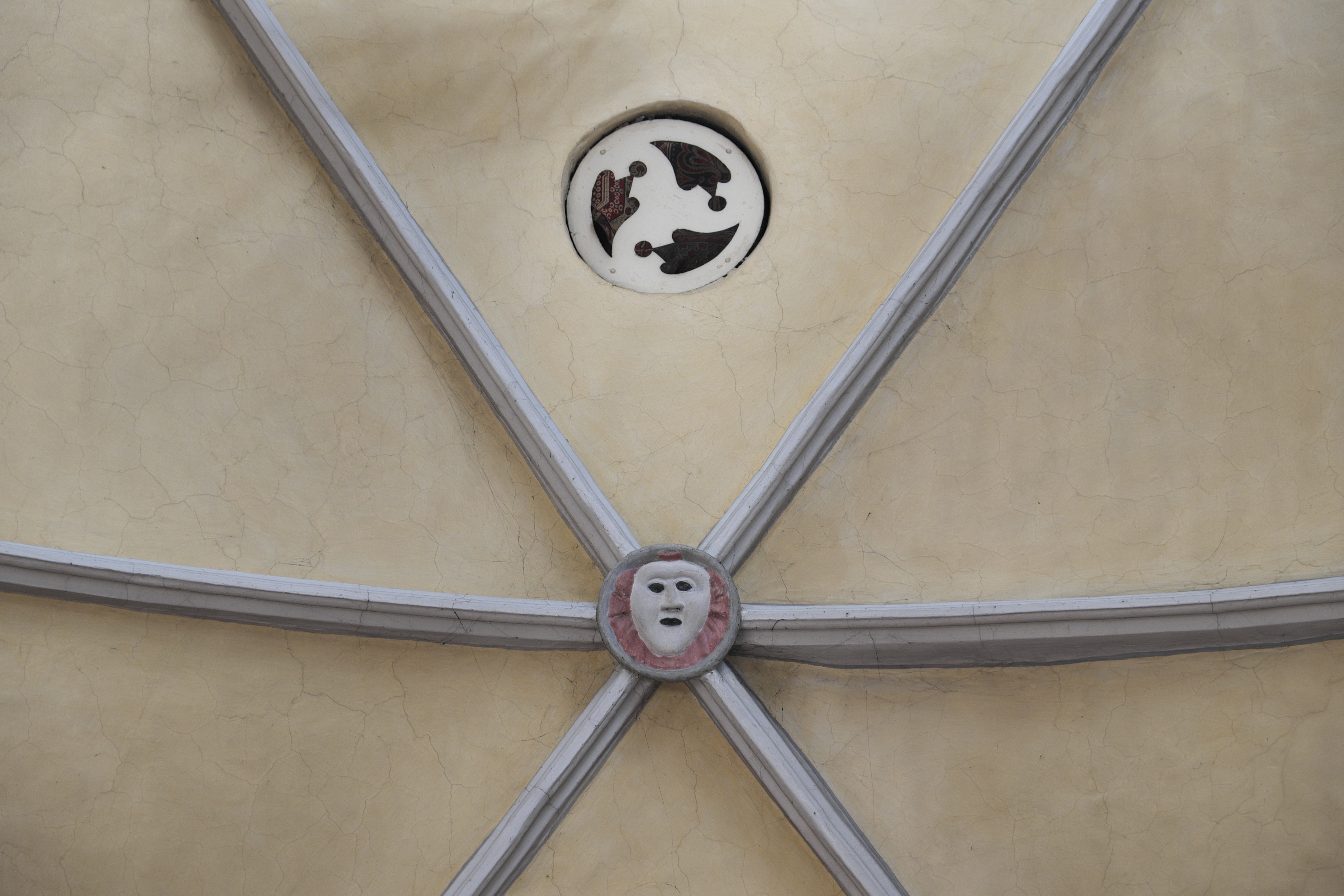 Katholische Pfarrkirche Mariä Himmelfahrt in Essenbach im Landkreis Landshut (Bayern/Deutschland), Kreuzrippengewölbe mit Schlussstein